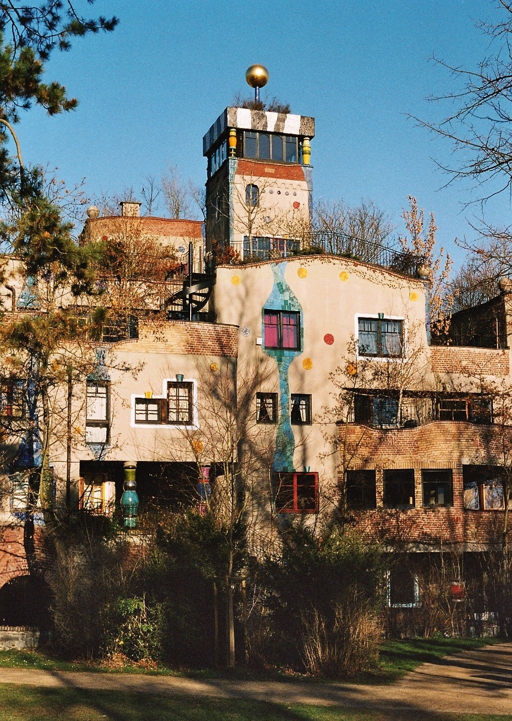 Residential building, designed by austrian architect Friedensreich Hundertwasser. Bad Soden am Taunus (suburban Frankfurt)